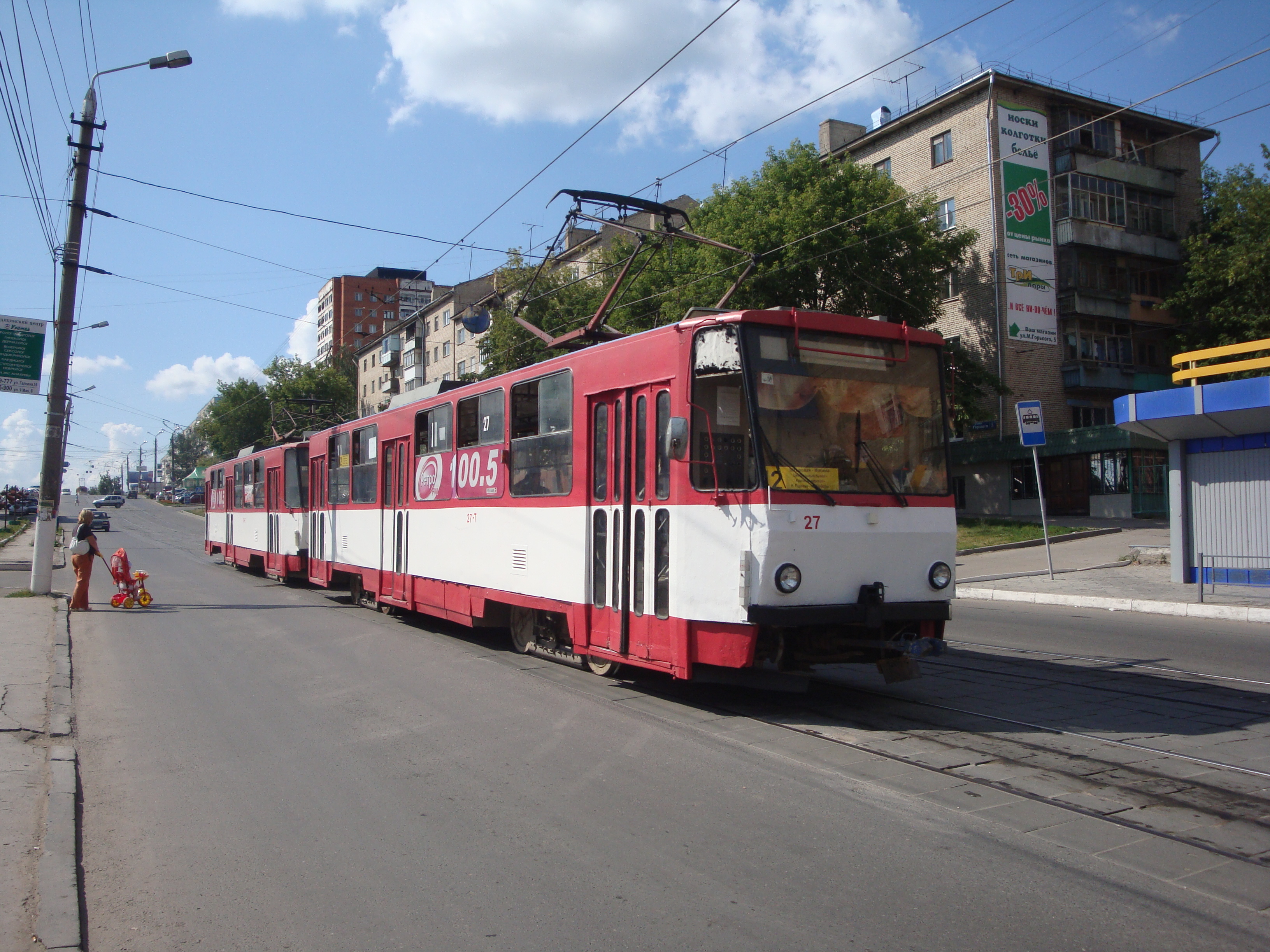 СМЕ 27-28